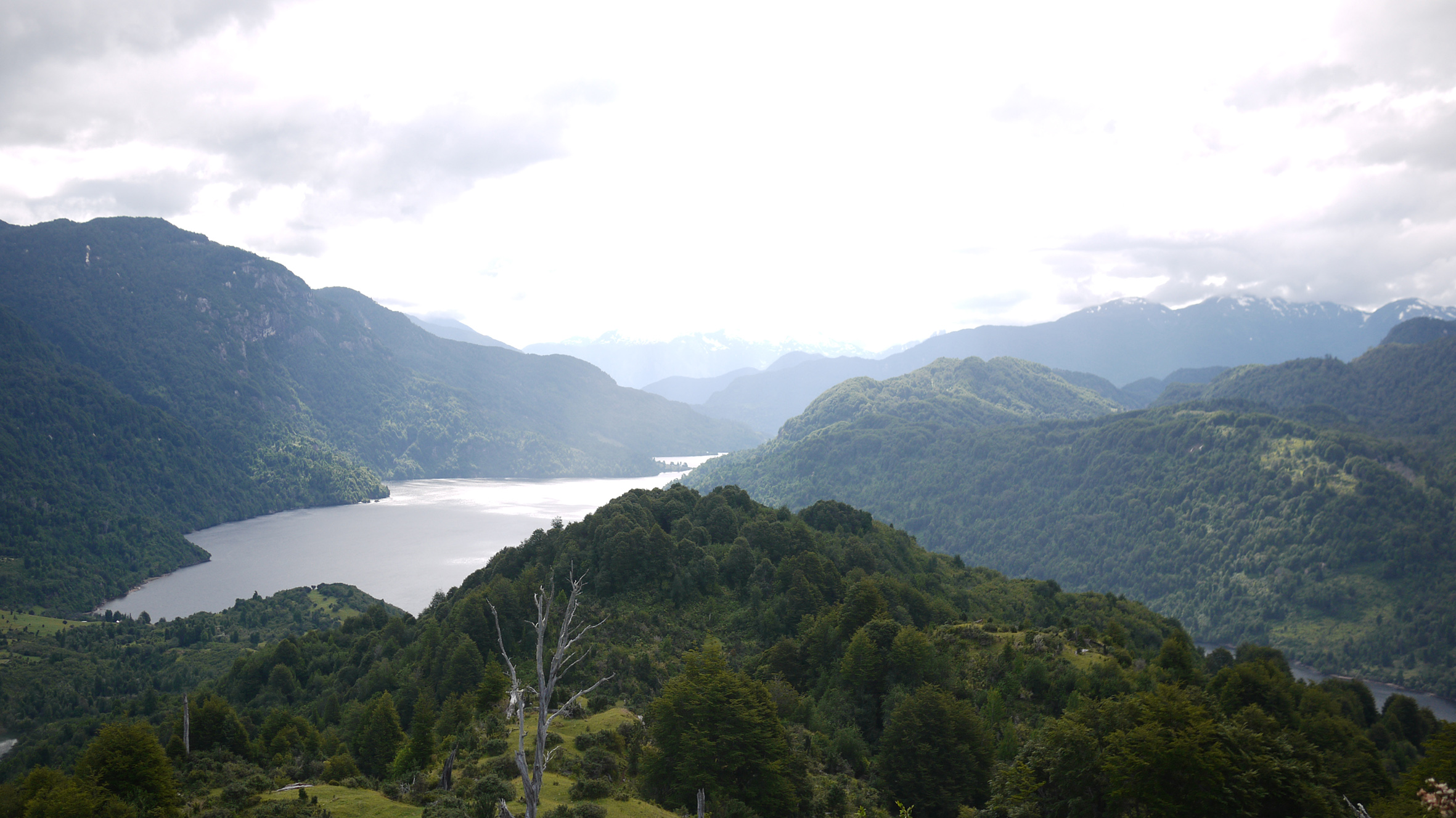 Lago Zenteno